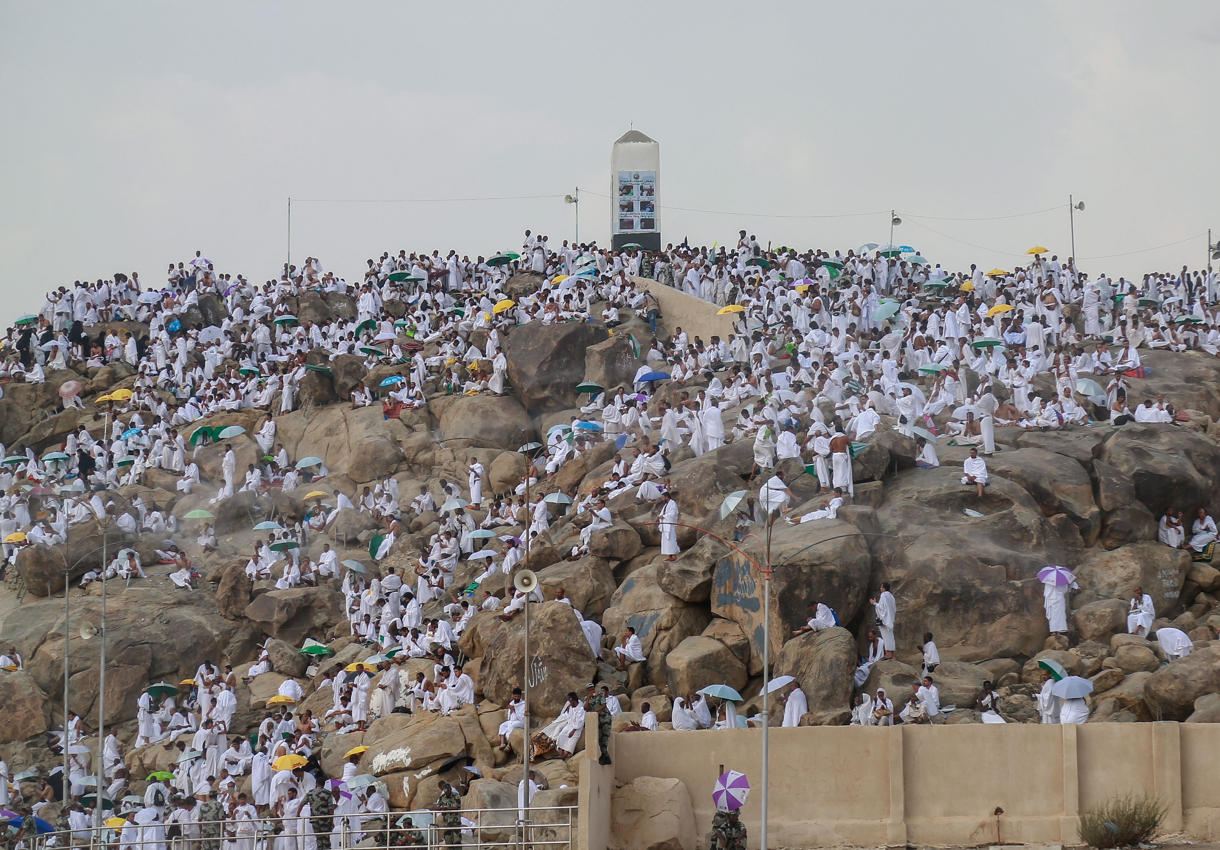 جبل عرفات